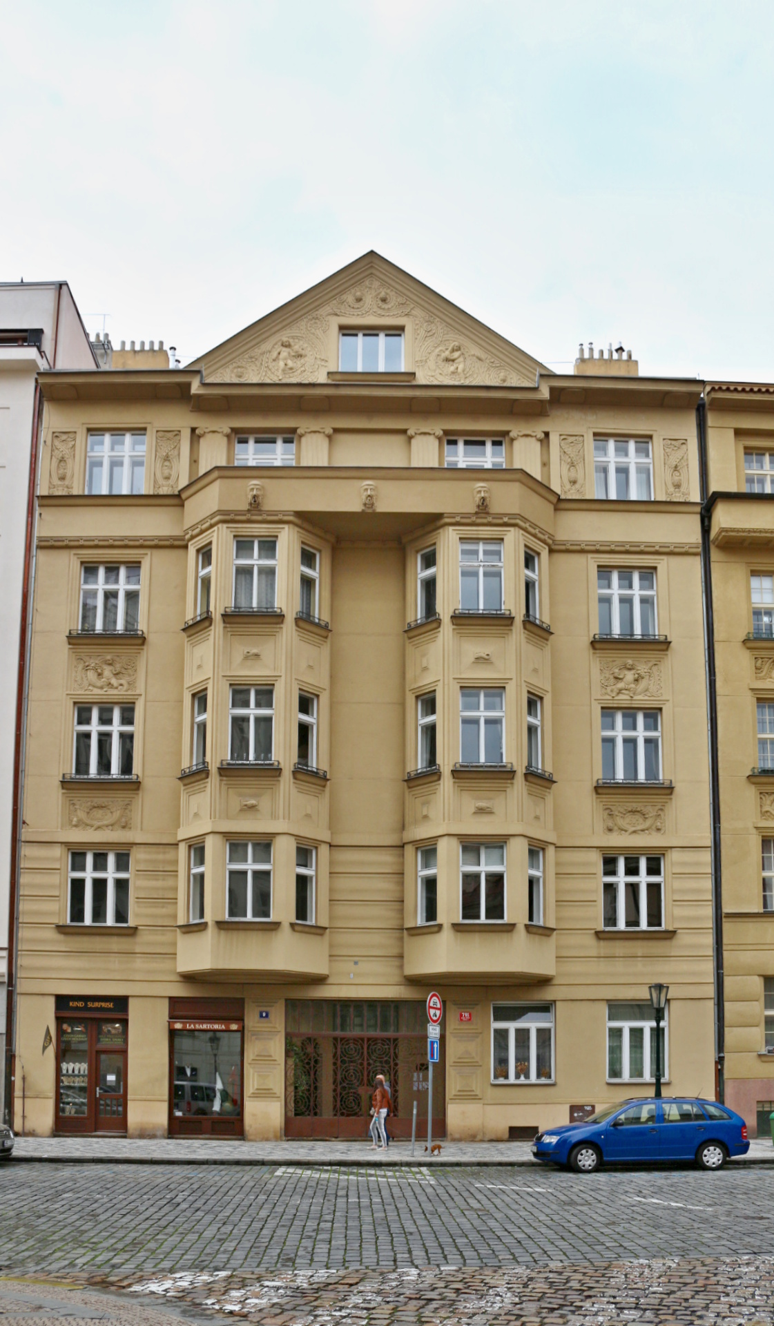 Haštalská ul. č. 9, dům, kde bydlel Josef Rybička